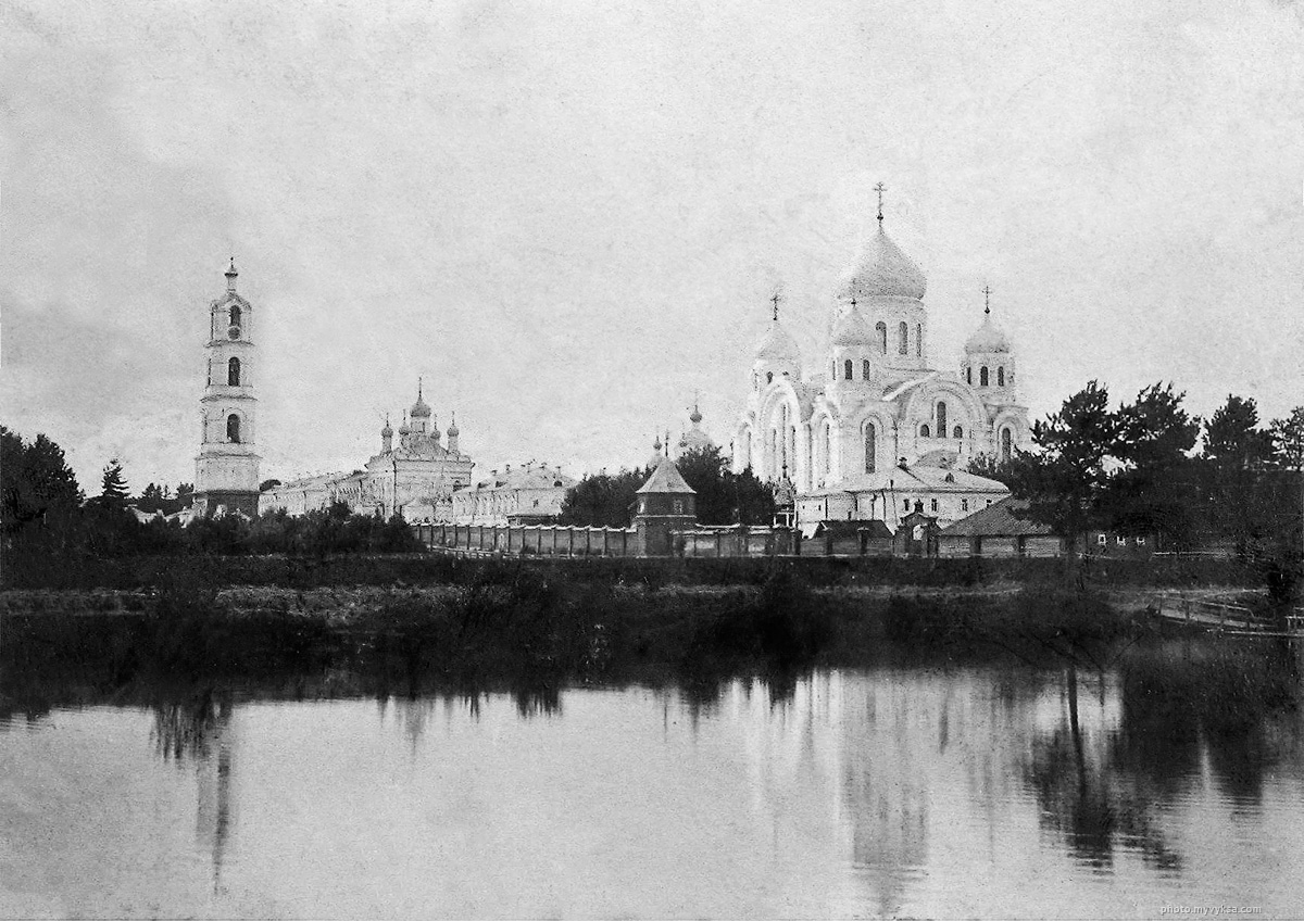 Выксунский Иверский монастырь (начало XX века)